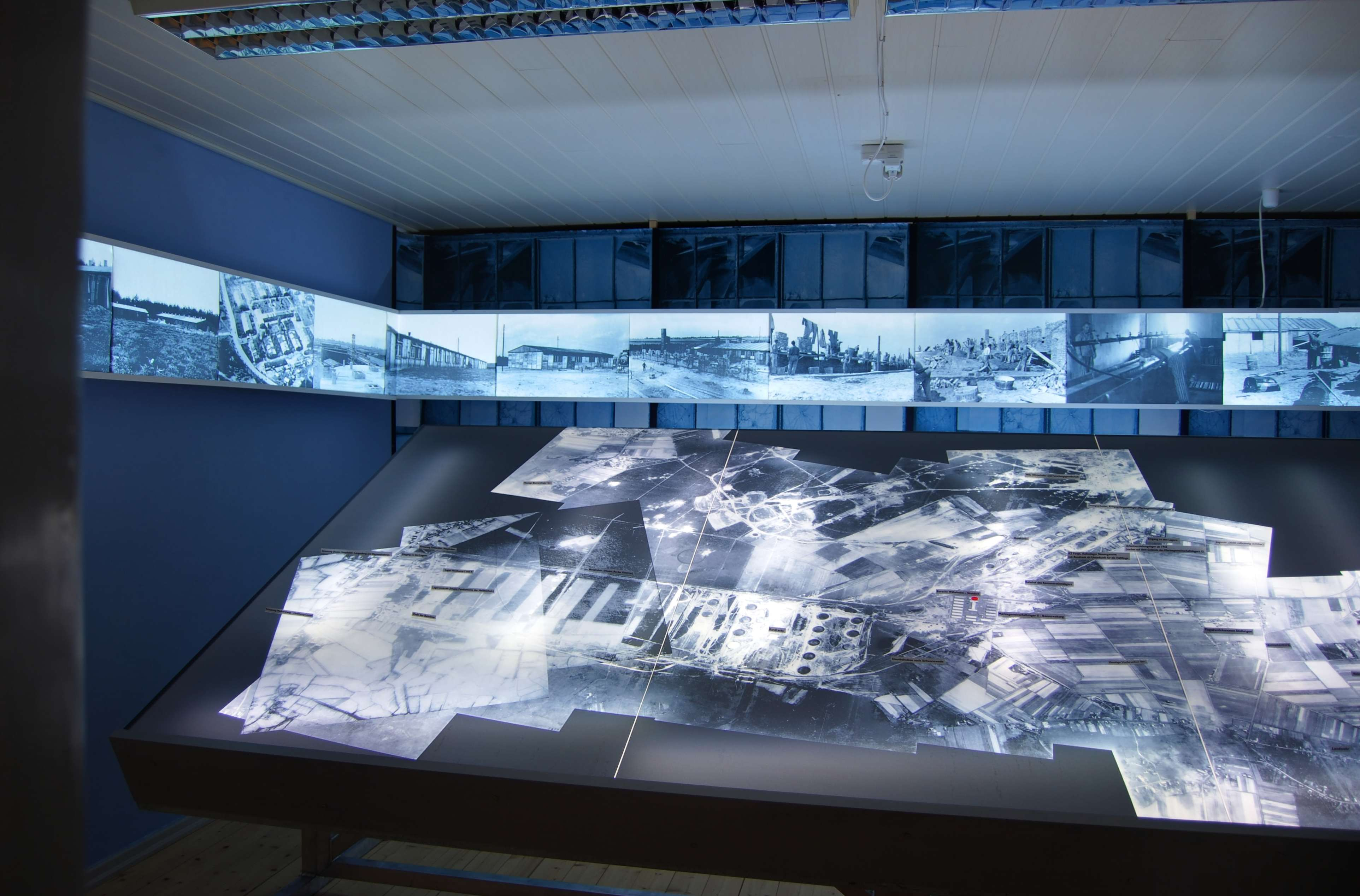 Raum "Lagerlandschaft" mit großem Luftbild von 1945 in der Gedenkstätte Baracke Wilhelmine in Schwanewede-Neuenkirchen in Niedersachsen/Deutschland.